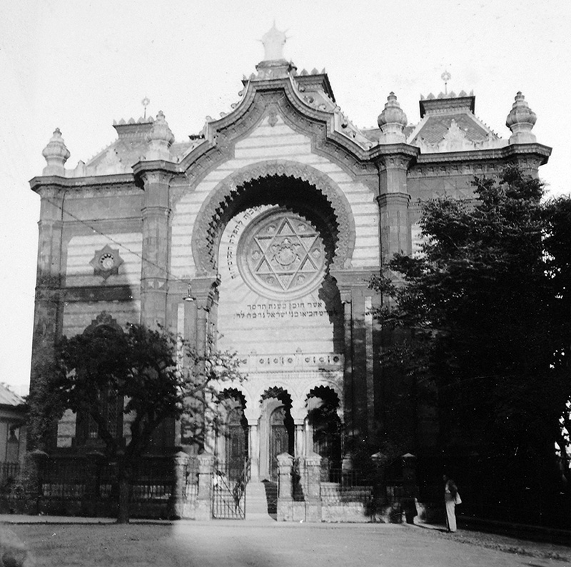 Синагога Ужгород 1920-і рр.